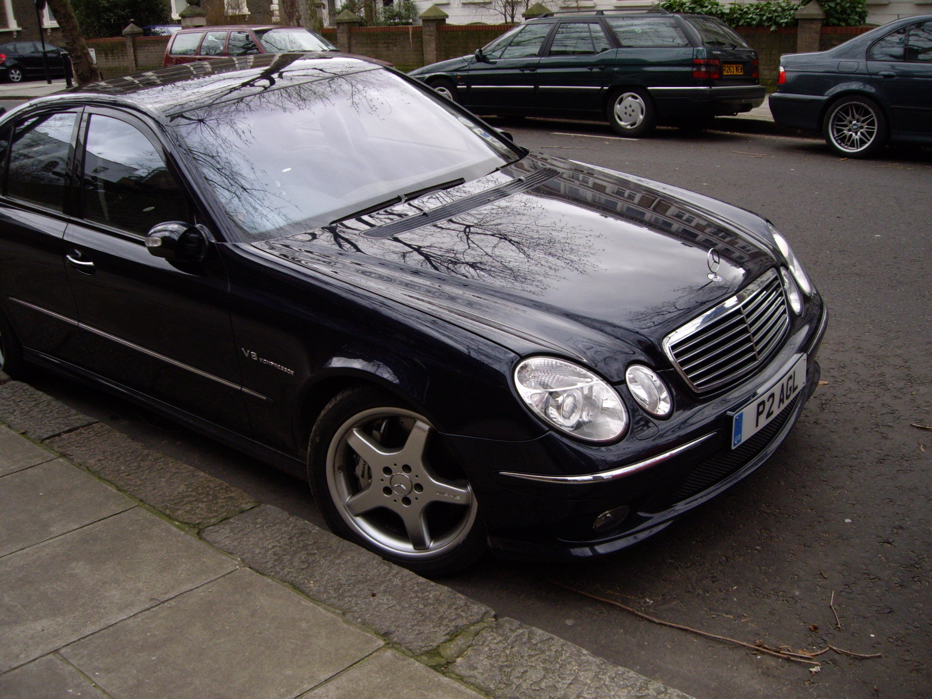 AMG E55